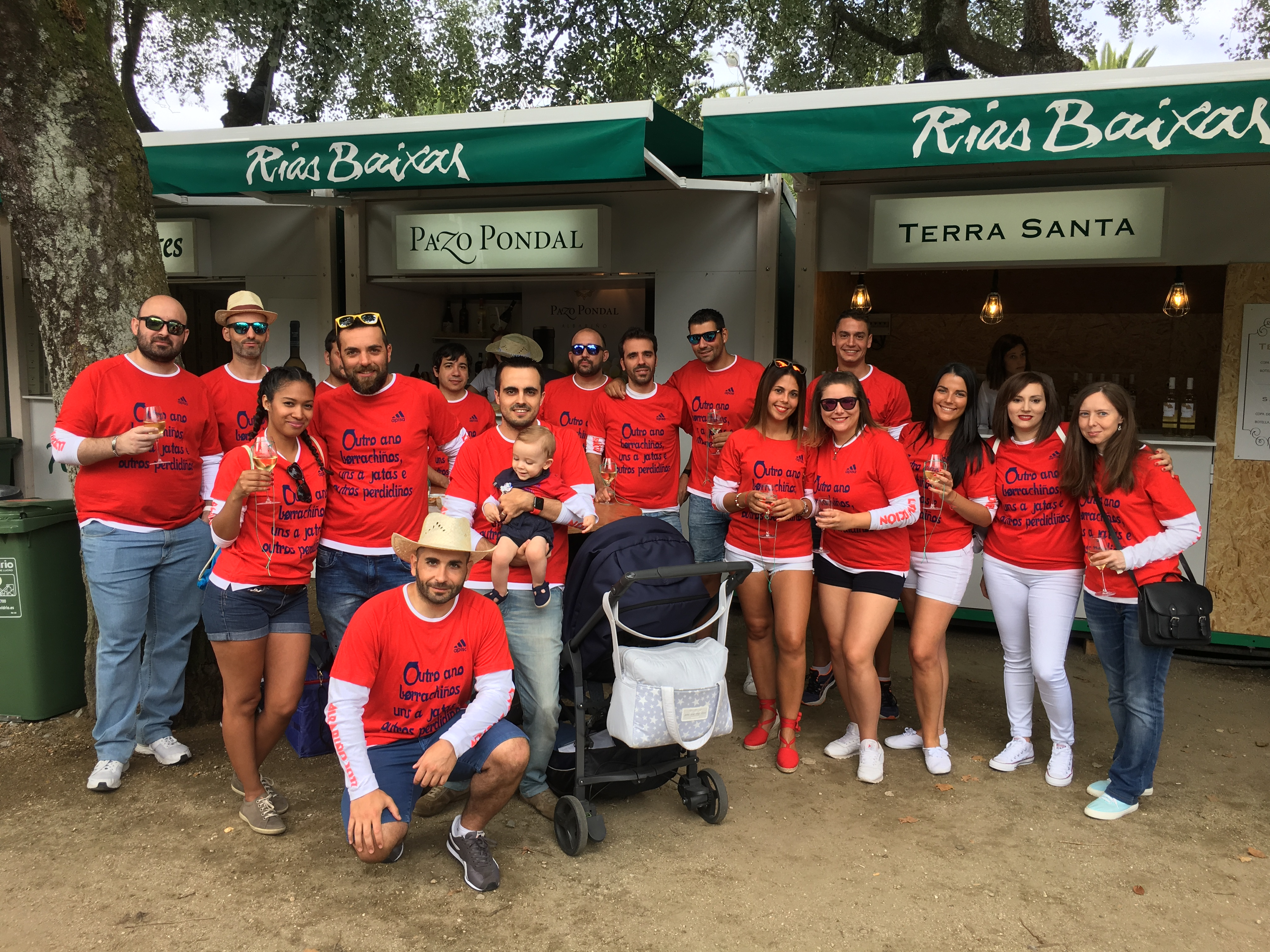 Inauguración Festa Albariño 2017